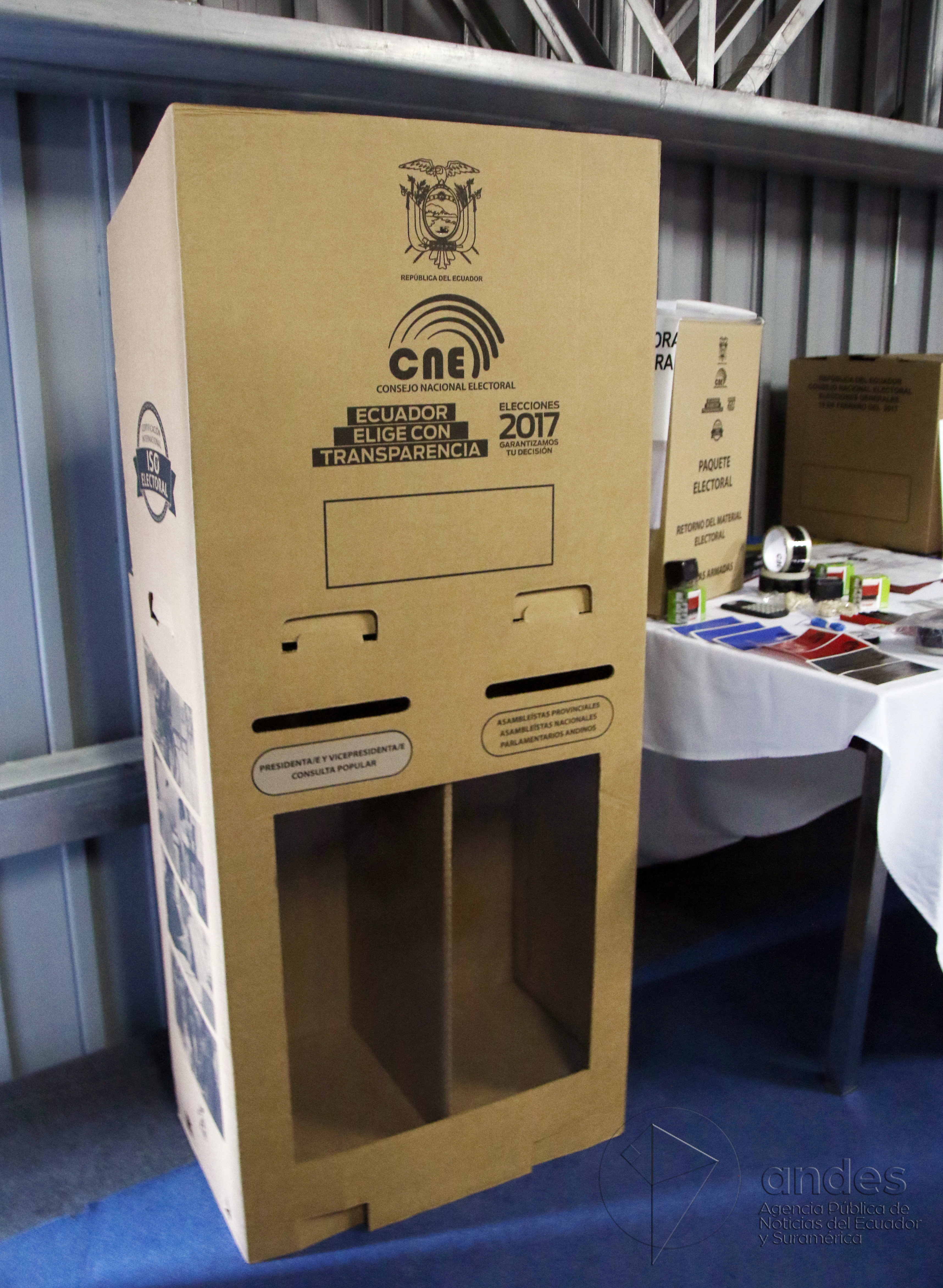 Quito, 25 enero de 2017 (Andes).- El CNE realiza la presentación del armado de los kits electorales en Cemexpo ubicado en la Mitad del Mundo. ANDES/Micaela Ayala V.